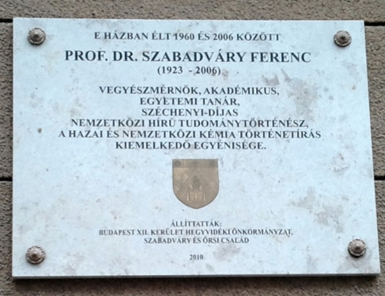 Szabadváry Ferenc emléktáblája - Budapest, Hegyvidék kerület, Németvölgy, városrész, Tartsay Vilmos utca 19.